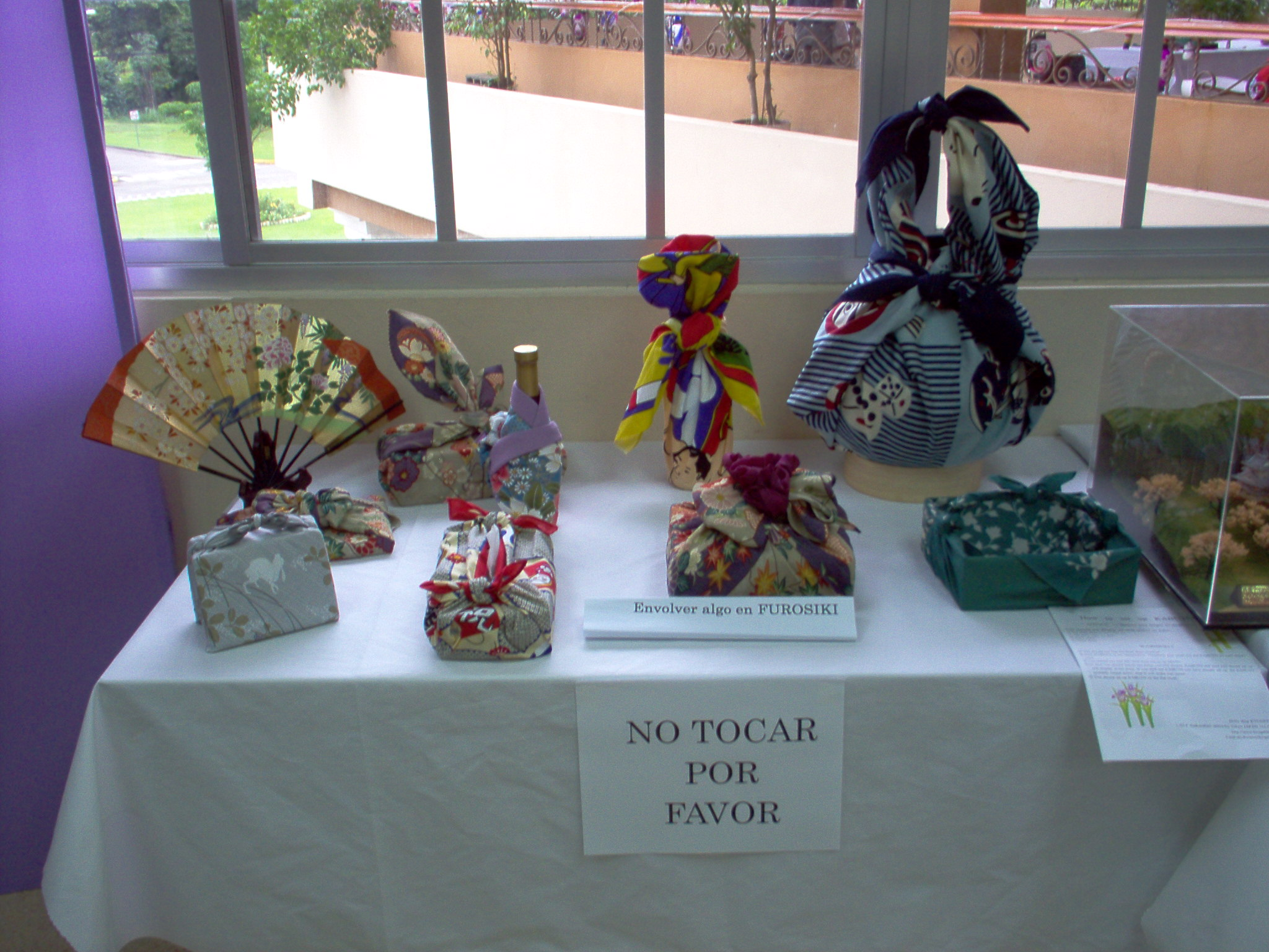 Regalos en furoshiki. Foto tomada por mí mismo en una feria japonesa en mi universidad